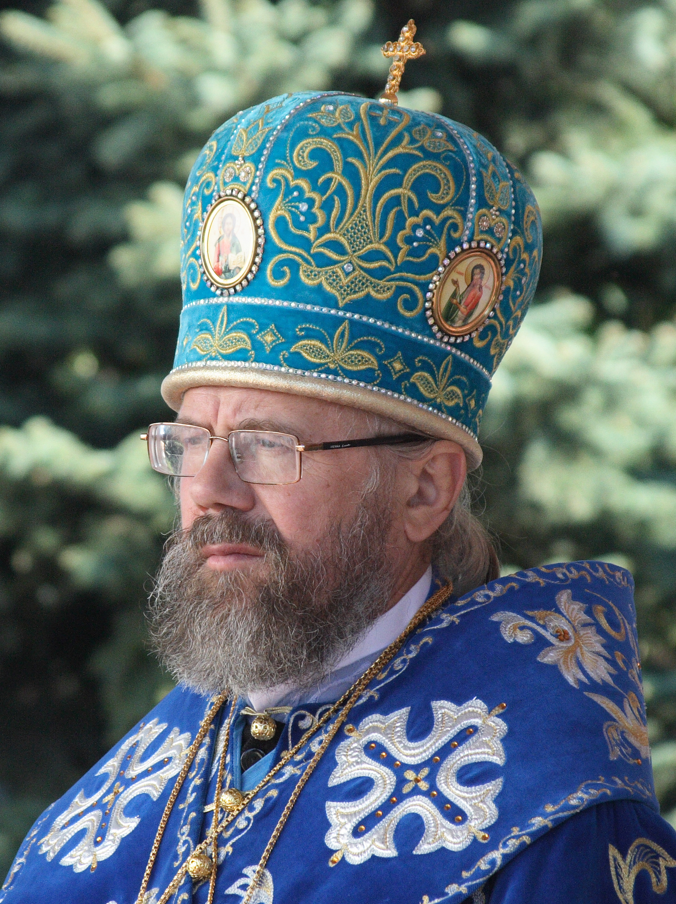 Архиепископ Львовский и Галицкий Августин в епископском облачении